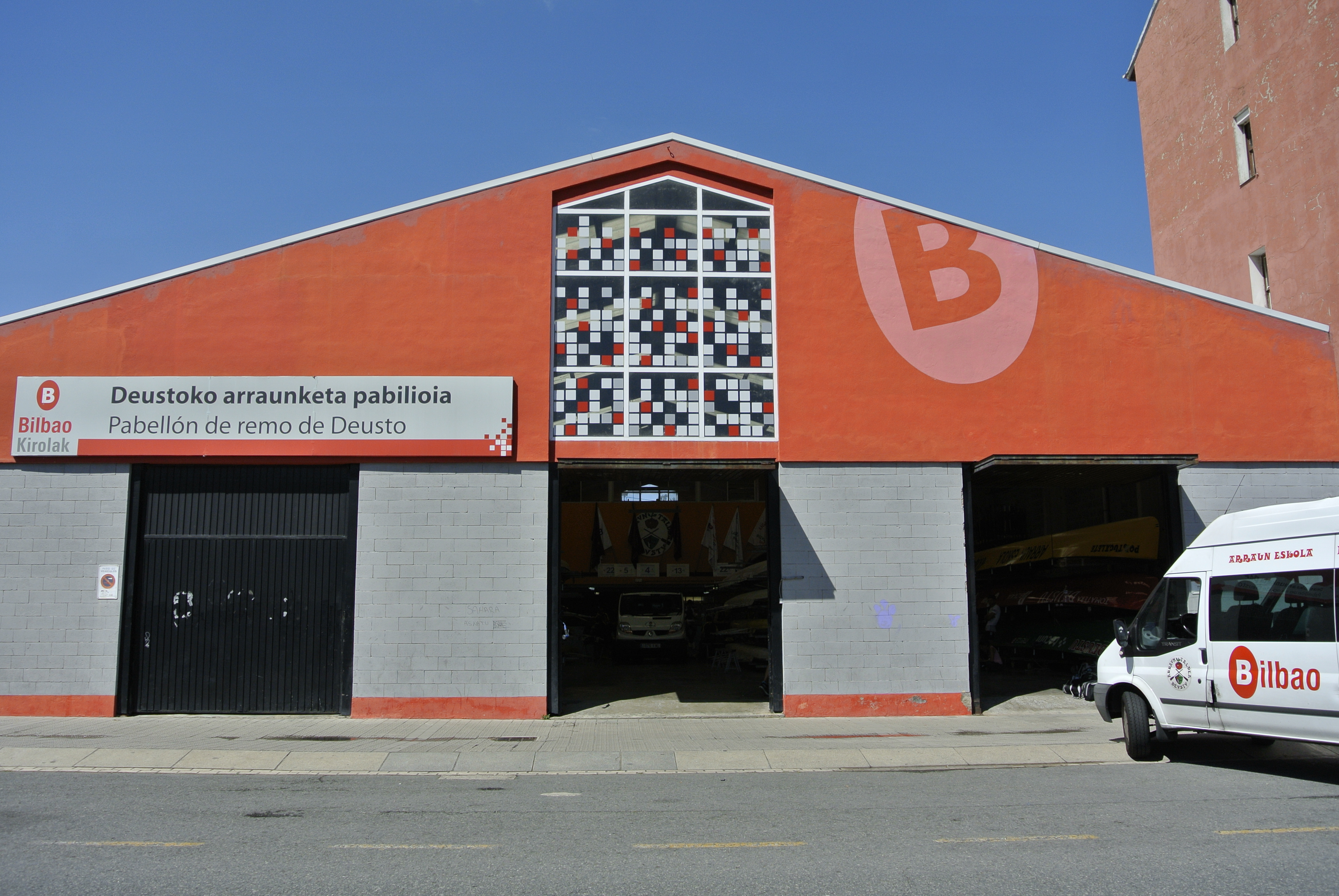 Fachada del edificio del Deustu Arraun Taldea